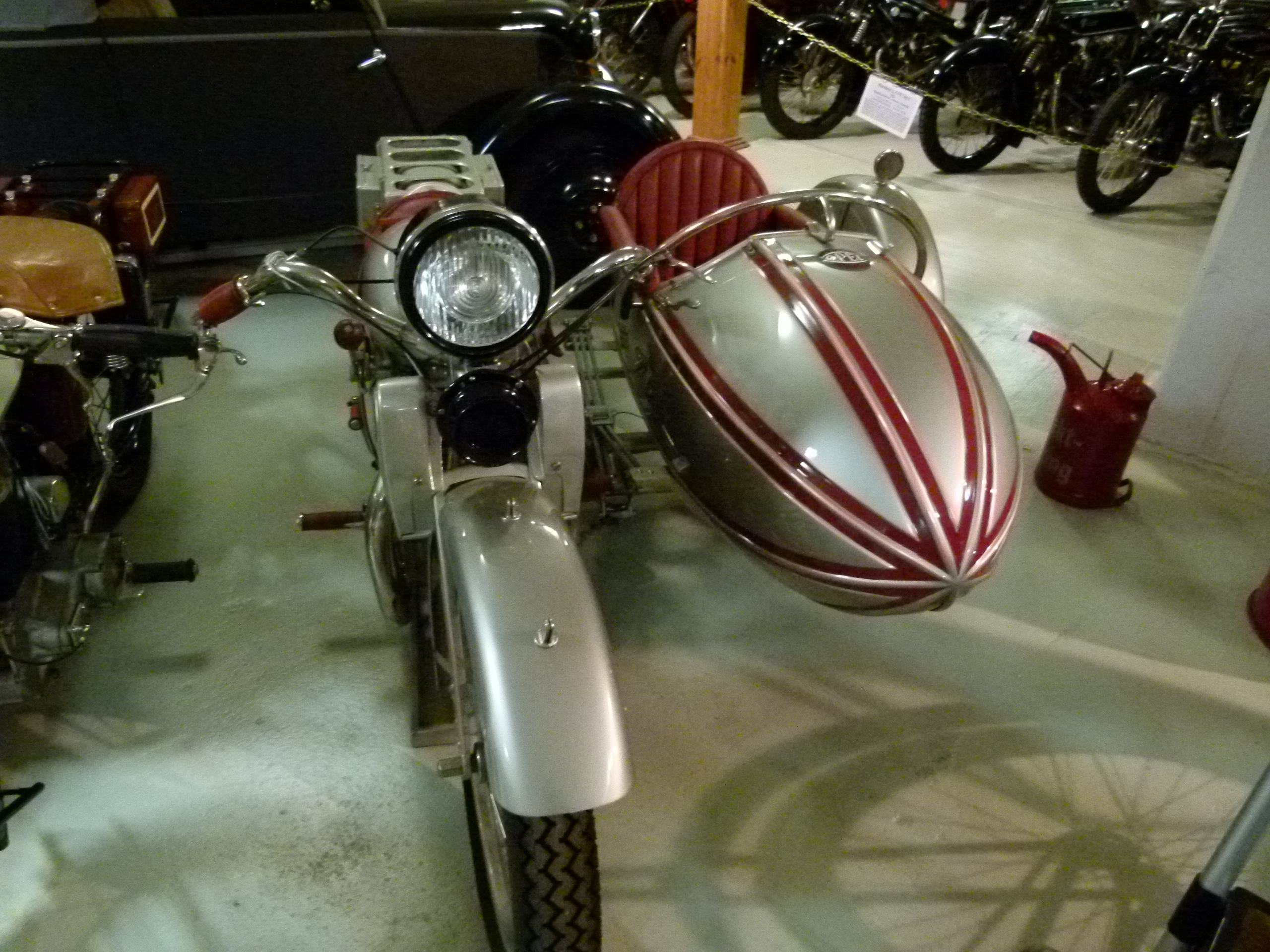 Motorrad Opel Elite 500, 1931, Fahrzeugmuseum Chemnitz